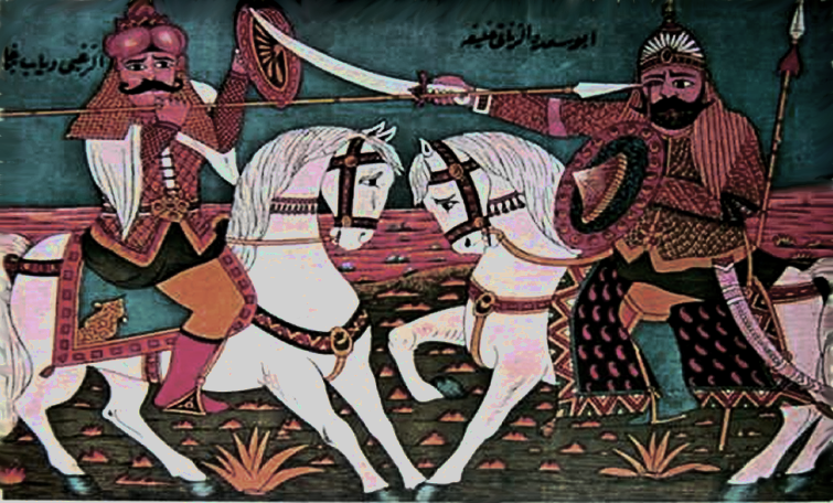 Zanati Khalifa vs Dhieb